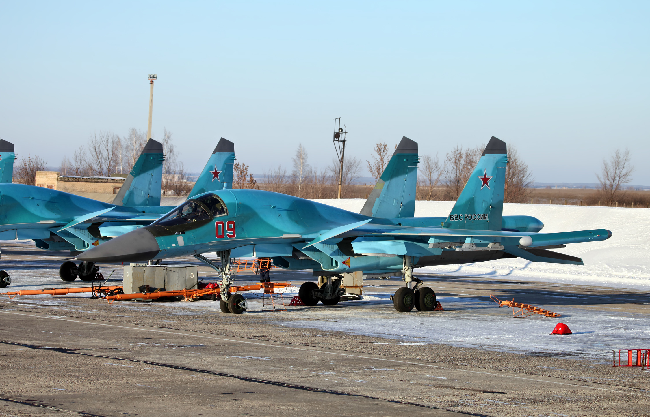 Су-34 бортовой номер 09 Красный (Su-34 09 Red)